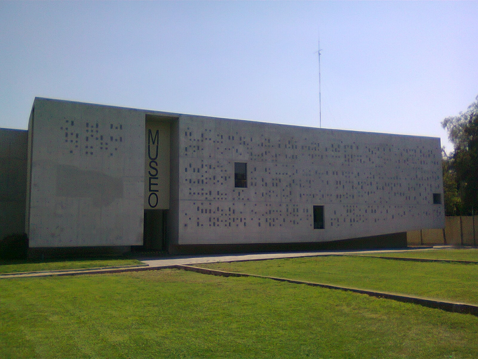 El Museo del Santuario Padre Hurtado ubicado en avenida Padre Hurtado 1090, comuna de Estación Central, en Santiago de Chile.